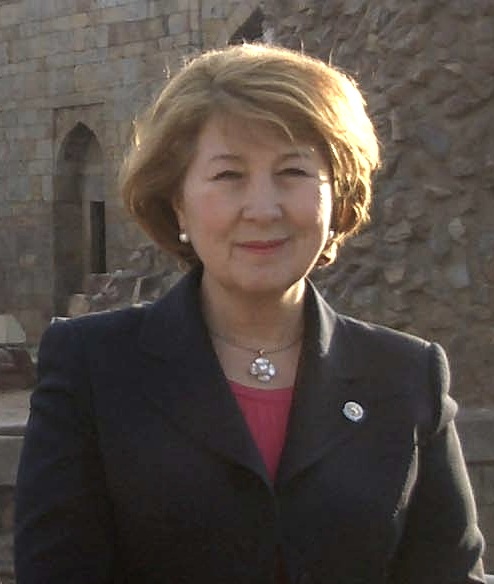 Зиля Валеева, Заместитель премьер-министра - министр культуры Республики Татарстан в Кутаб-Минар, Дели, Индия